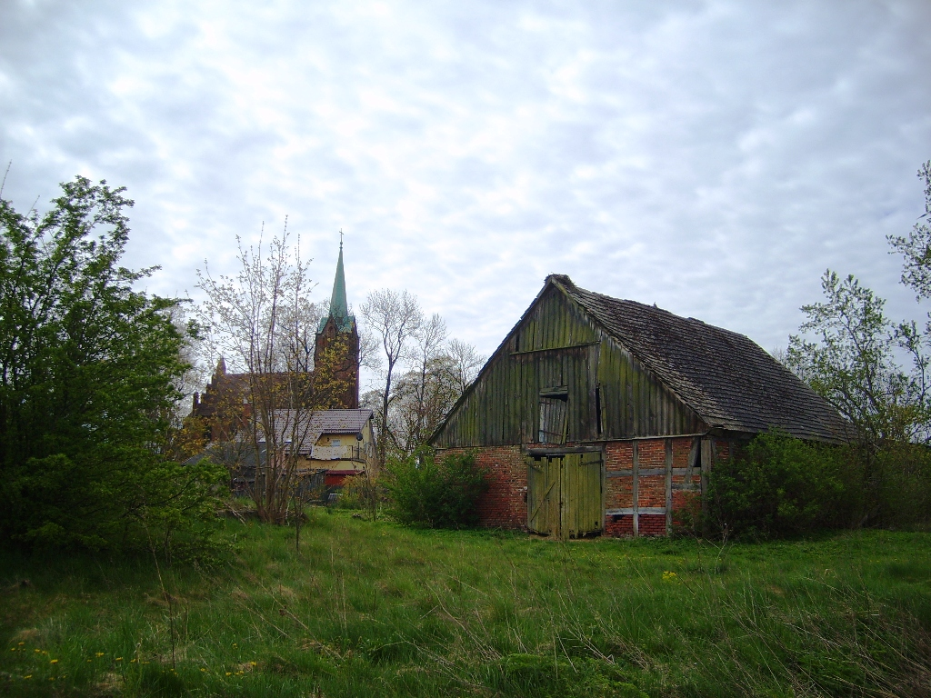 Stara stodoła i Kościół w Cecenowie.